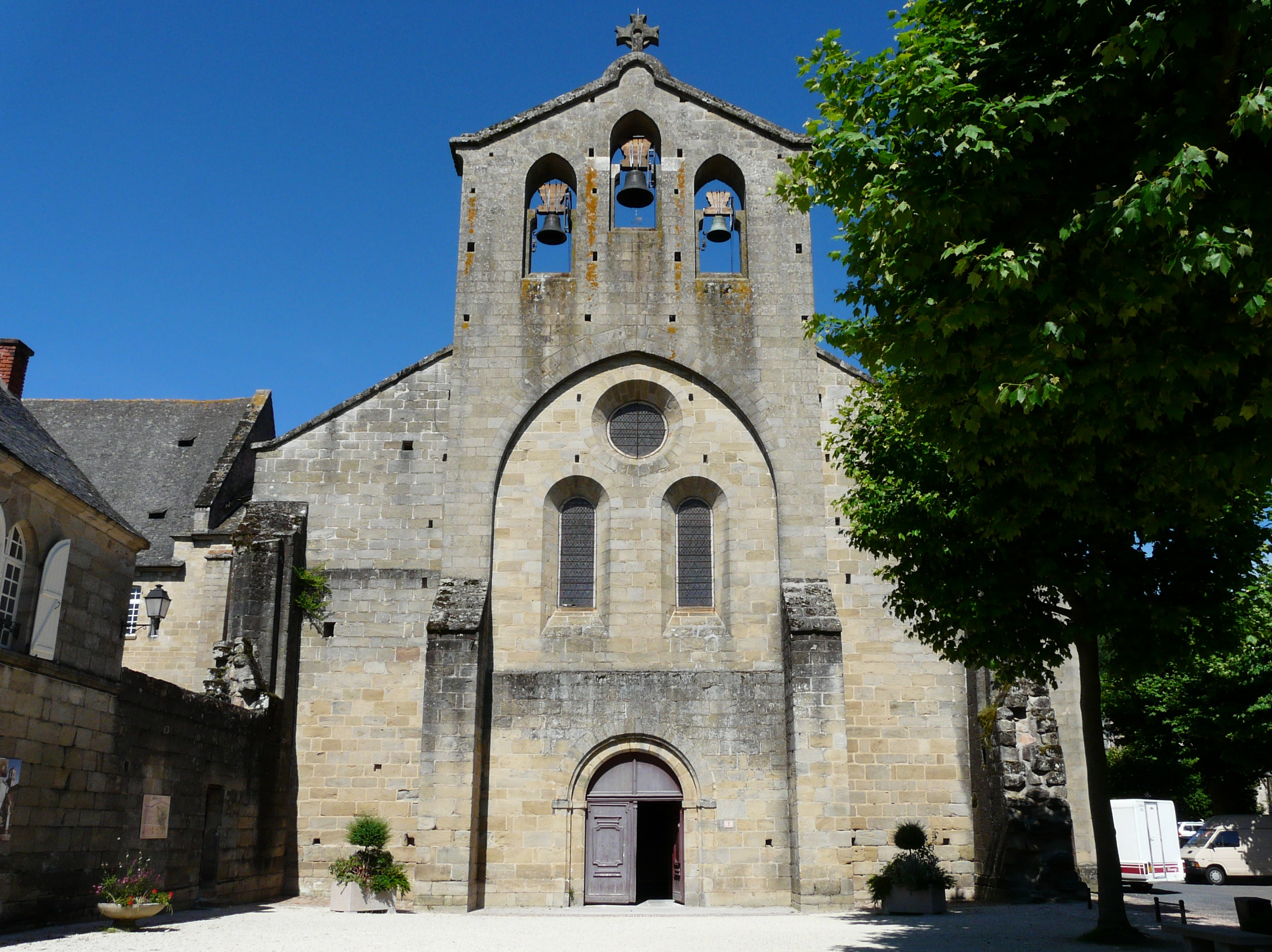 Le clocher-mur de l'église abbatiale d'Aubazine, Corrèze, France